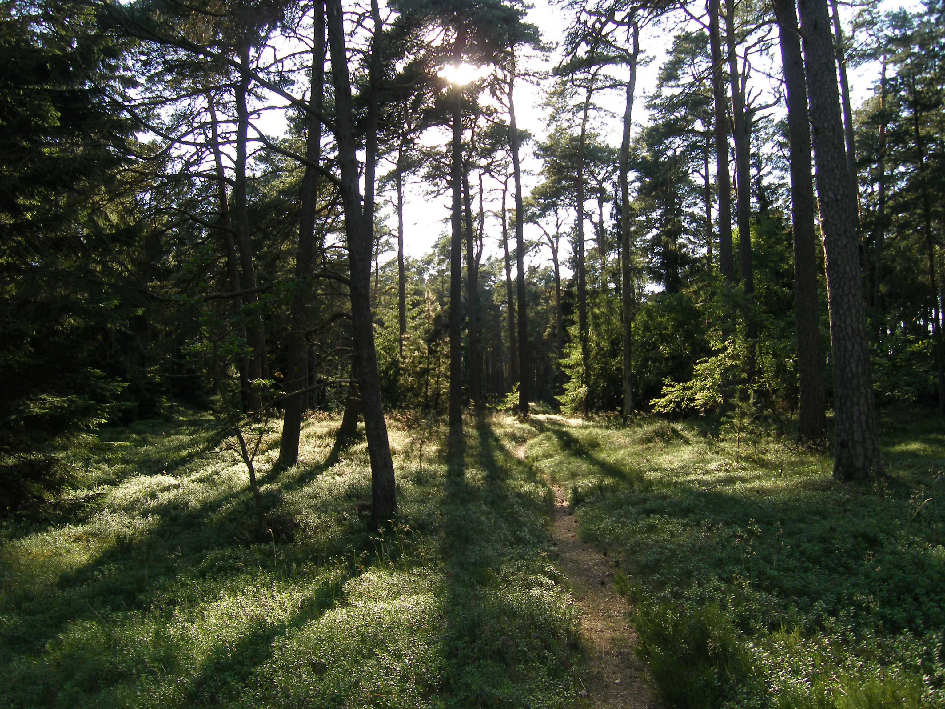 Skoven ved den "Kunstige"